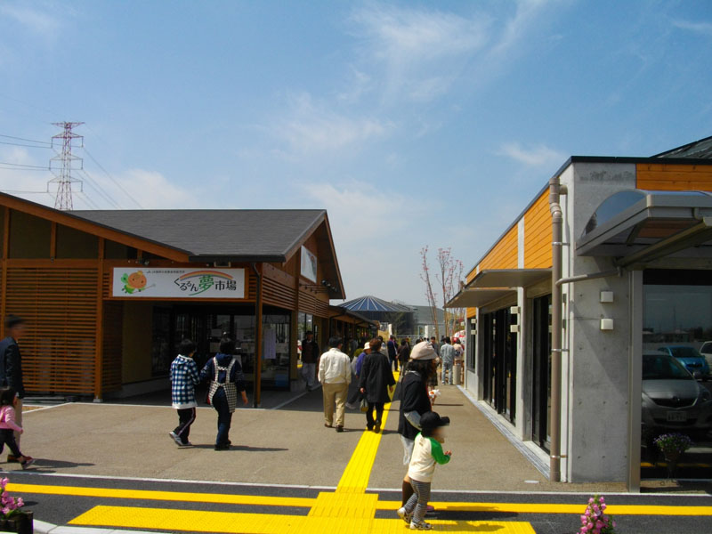 道の駅 おおき（福岡県三潴郡大木町）